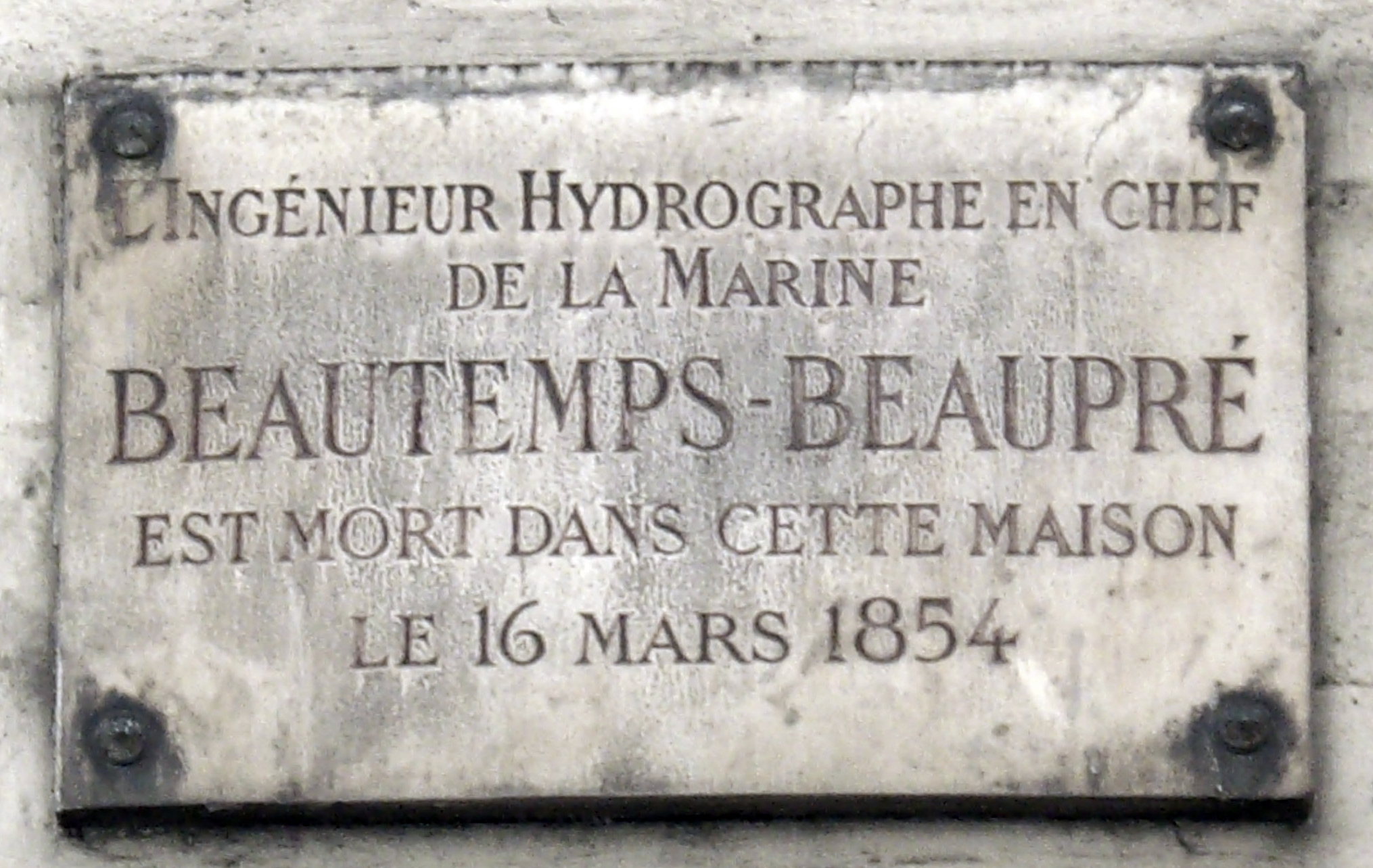 Plaque apposée au n° 54 de la rue des Saints-Pères, Paris 6e, où mourut le cartographe et ingénieur hydrographe Charles-François Beautemps-Beaupré (1766-1854) le 16 mars 1854.